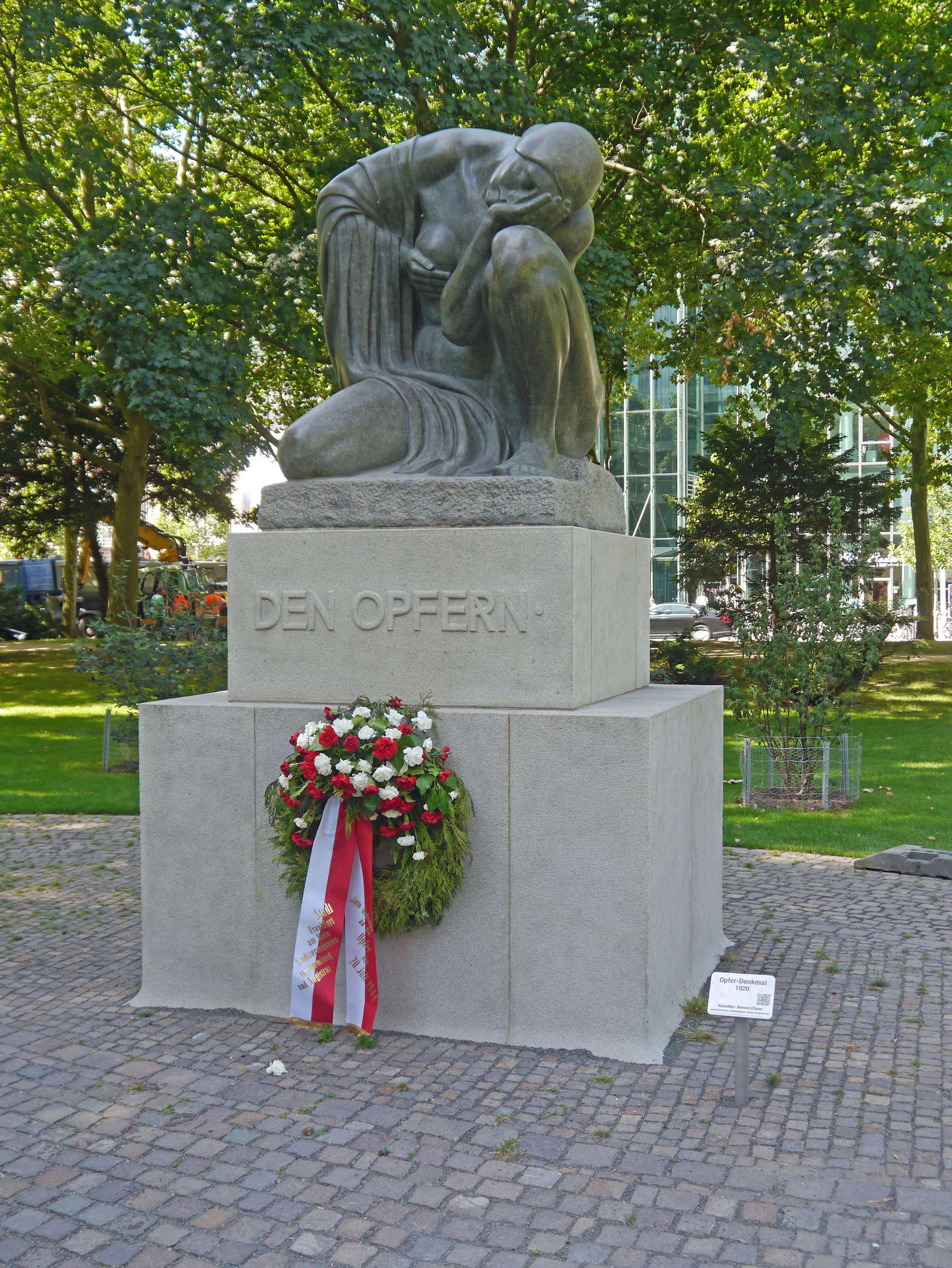 Das Mahnmal Den Opfern (Erster Weltkrieg), 1920 eingeweiht. Sockel aus schwedischem Granit mit Bronzeskulptur Heldenklage, bereits 1913-1914, von Benno Elkan. In der Gallusanlage Ffm-Innenstadt. Nach seiner Umsetzung auf die Westseite der Gallusanlage.